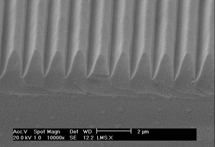 Observation au microscope électronique à balayage d’un réseau de surface façonné sur un matériau hybride. Auteur : Frédéric Chaput. Licence GFDL Frédéric Chaput